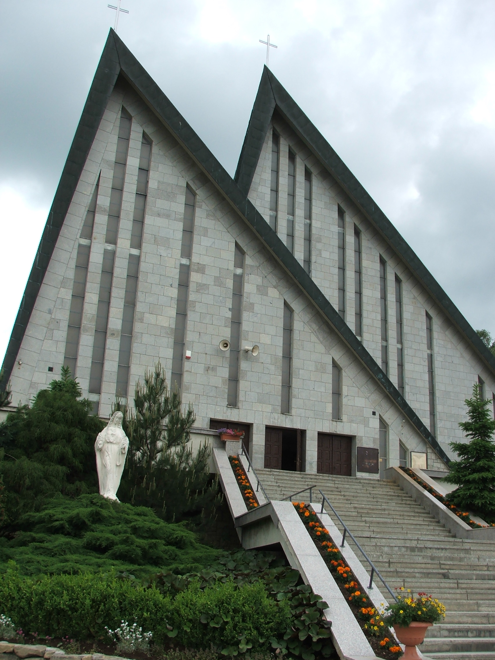 Kościół pasierbiecki